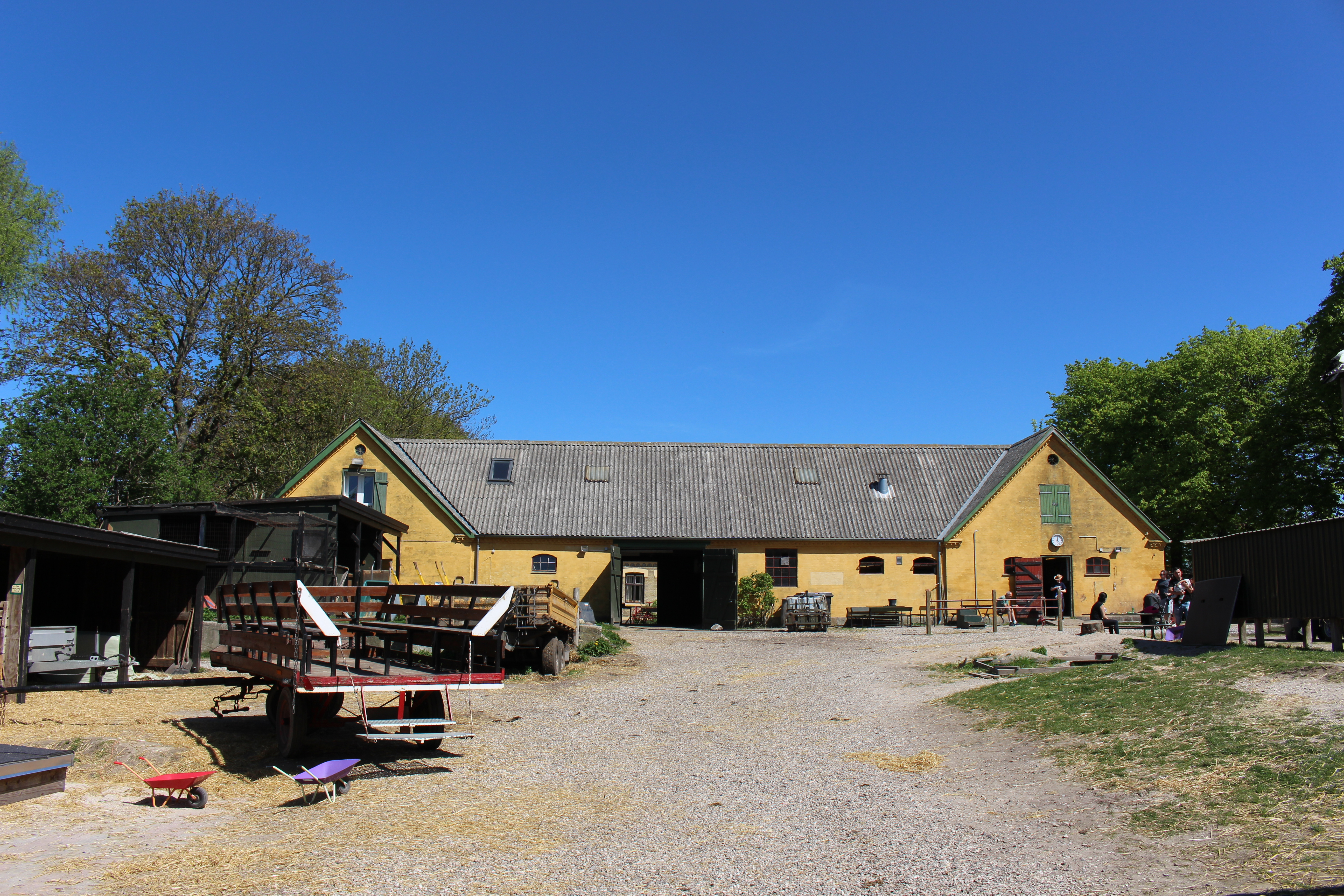 Dyregården Toftegården i Albertslund